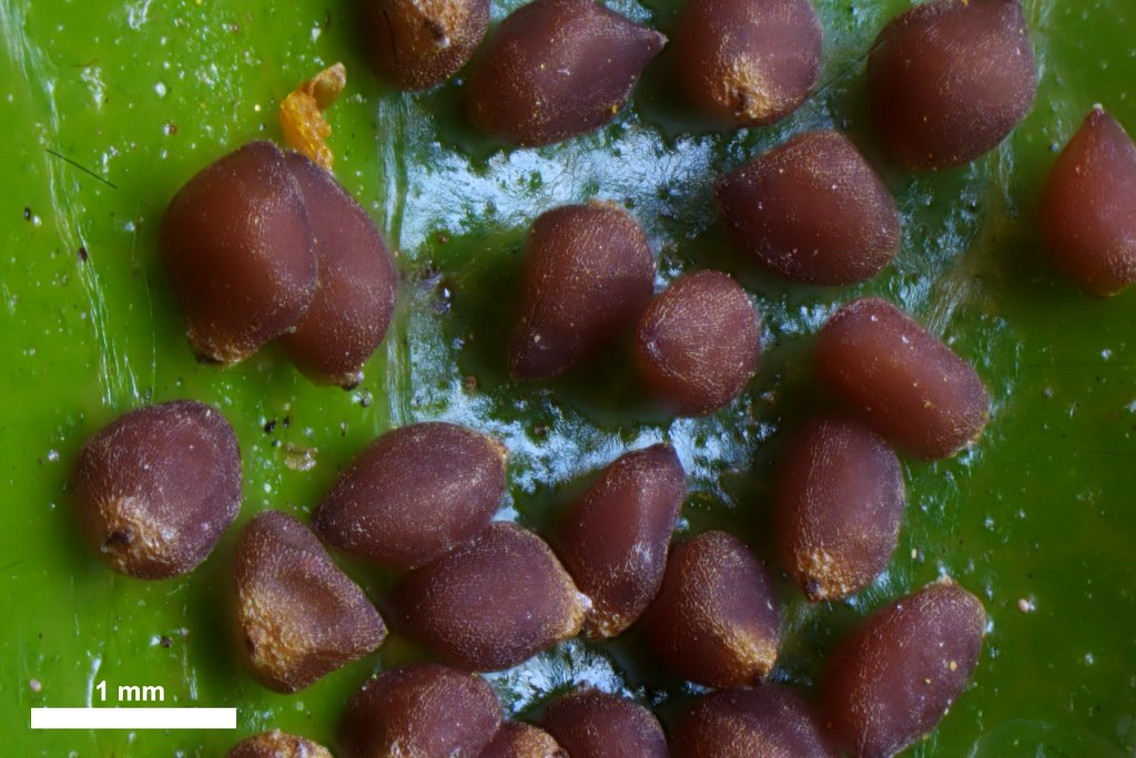 Samen von Zistrose (Cistus ladanifer)